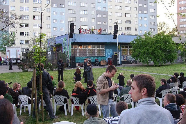 Żywiołak @ Plama 2. Gdański Archipelag Kultury, ul. Pilotów 11.